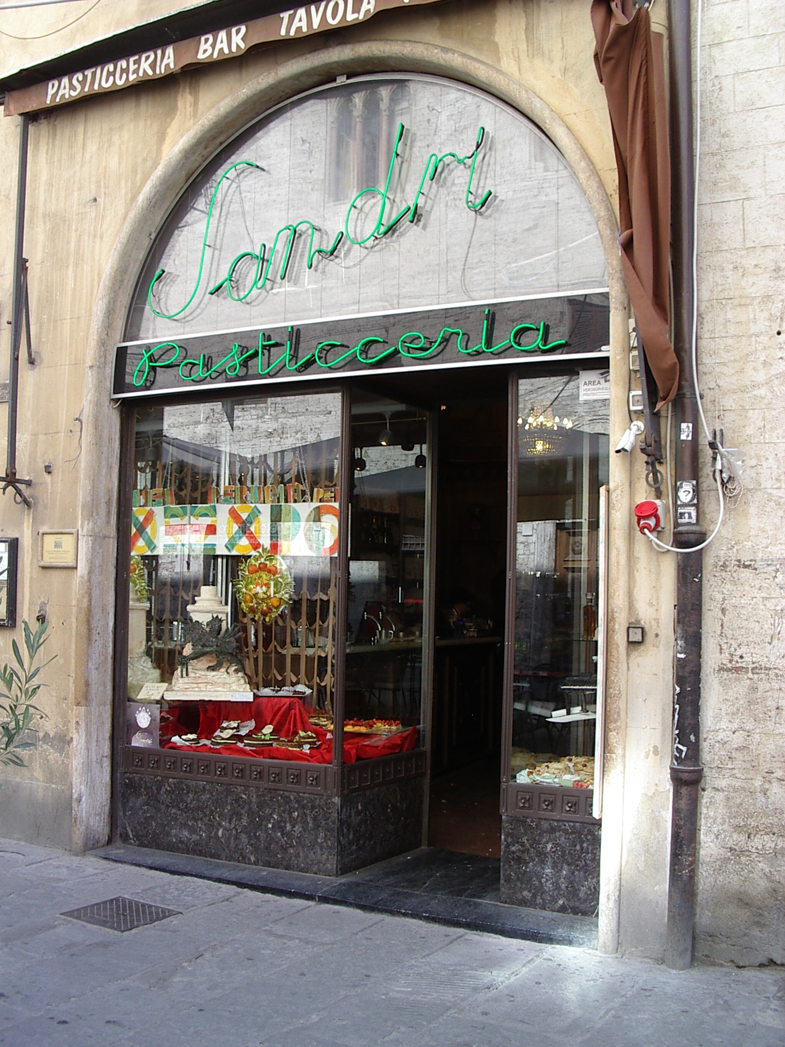 Caffè-Pasticceria Sandri à Pérouse, Italie